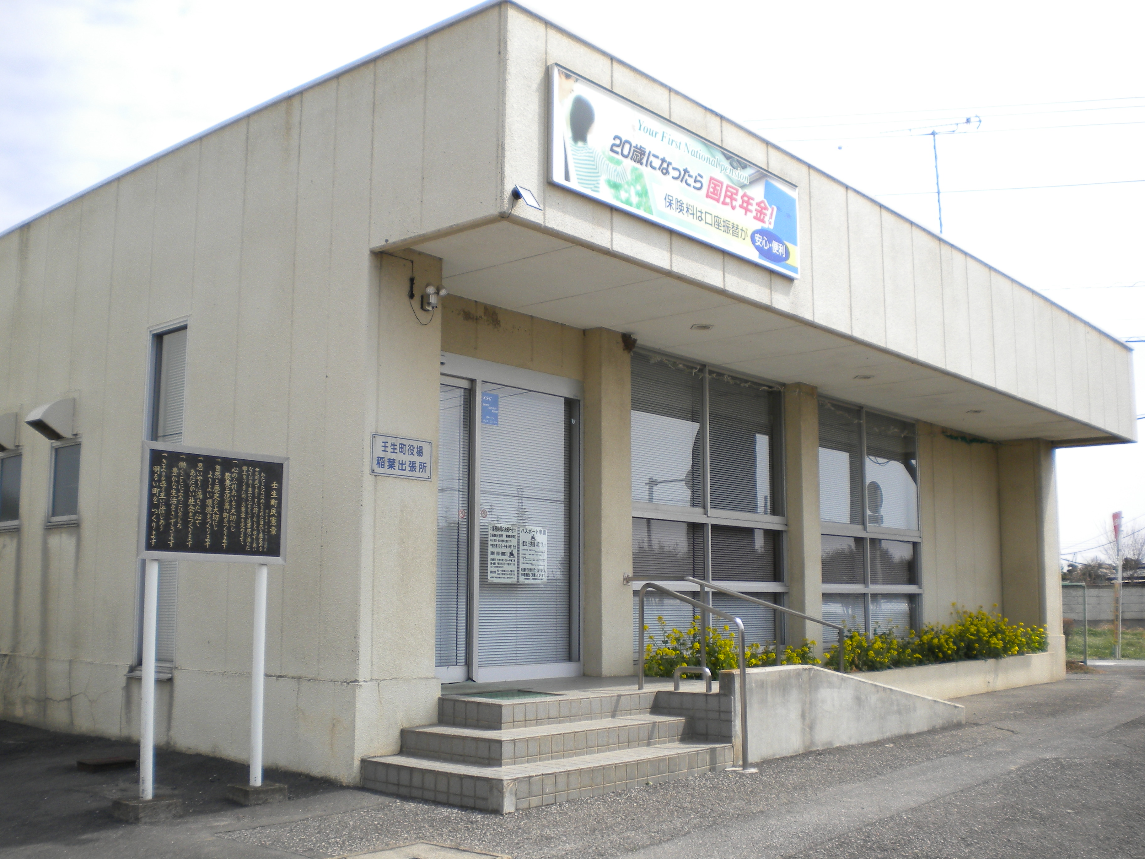 栃木県下都賀郡壬生町大字上稲葉 壬生町役場稲葉出張所